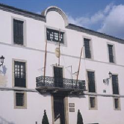 Ayutamiento de Castropol